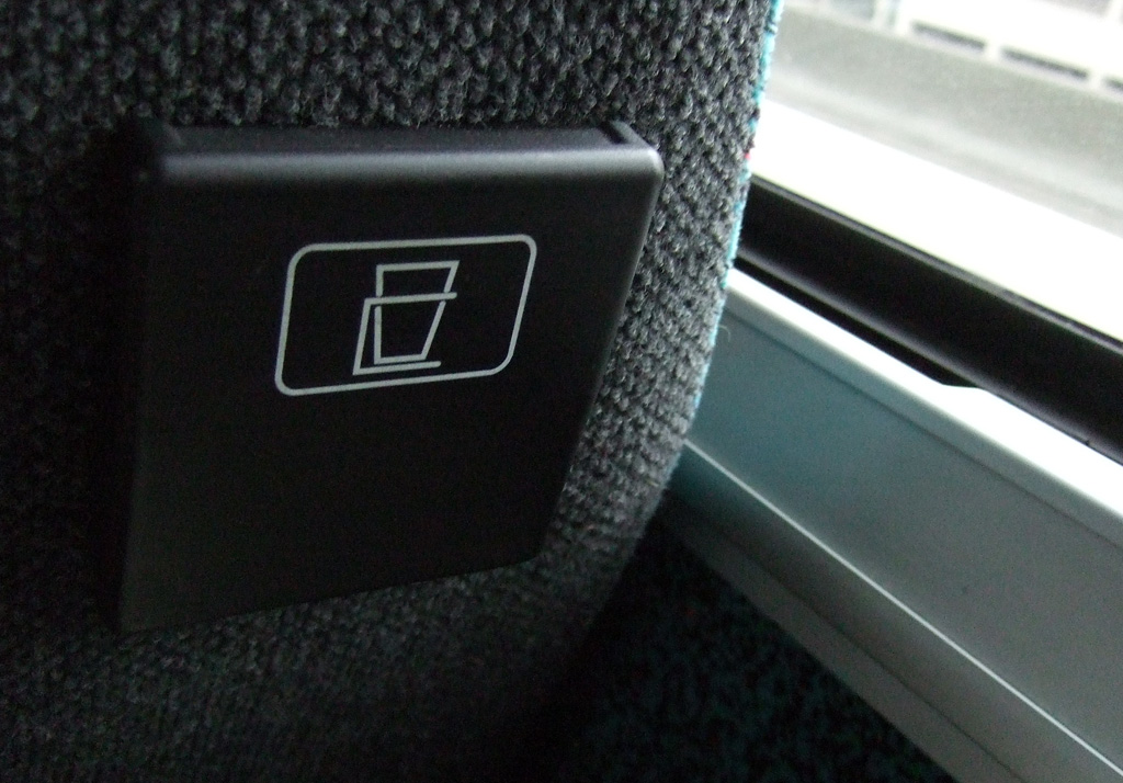 Becherhalter in einem Reisebus Cup holder on a coach seatback